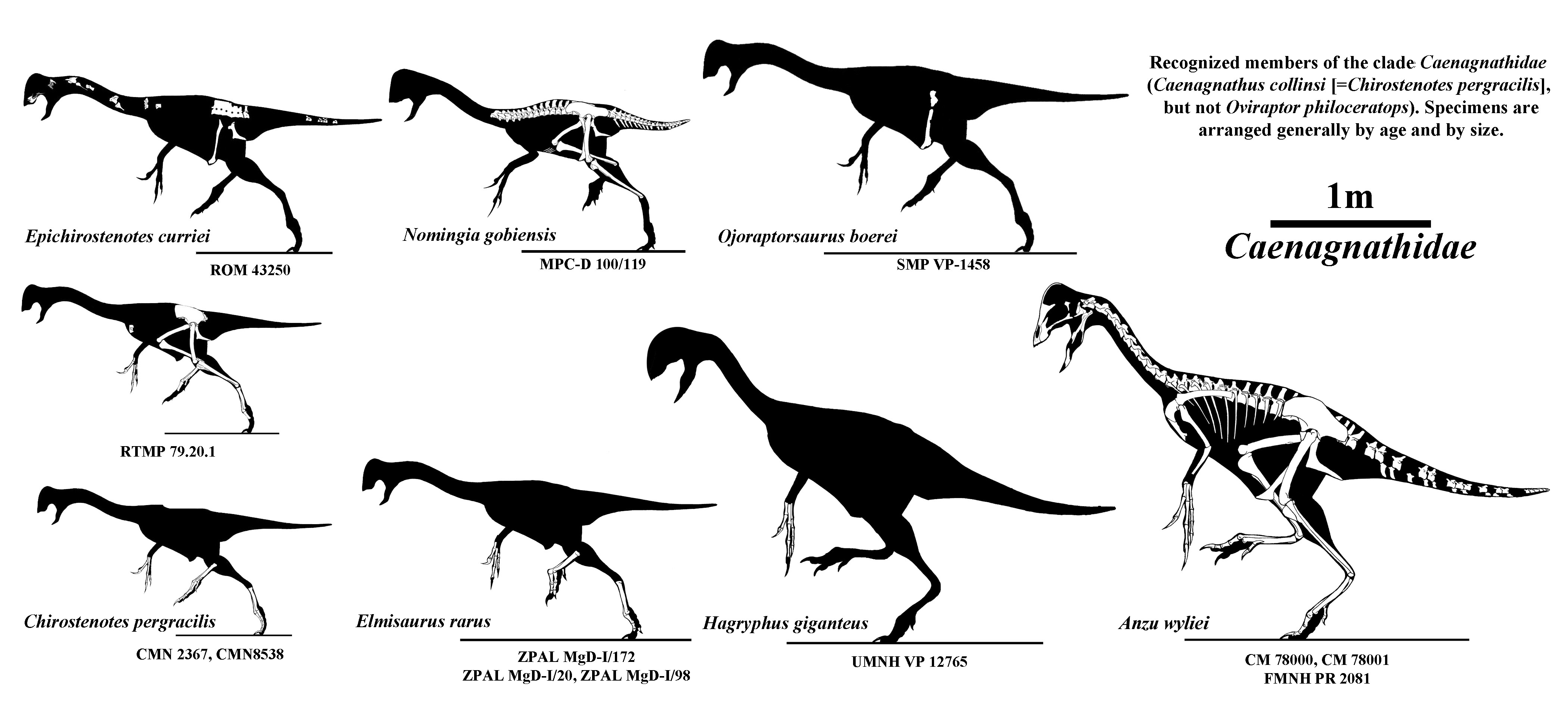 Caenagnathidae skeletons to scale.